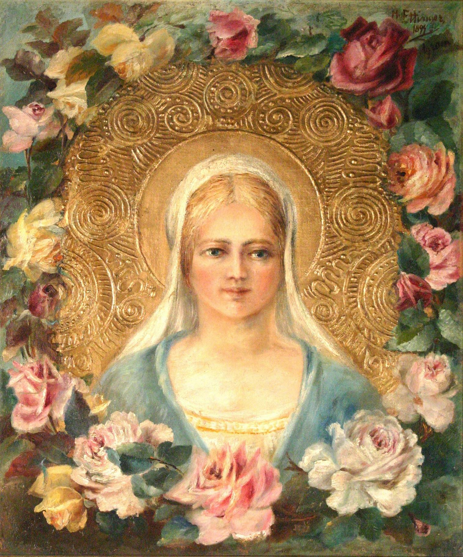 Slika "Marija u ružičnjaku" od Mare Šarić rođene Ettinger, ulje na platnu